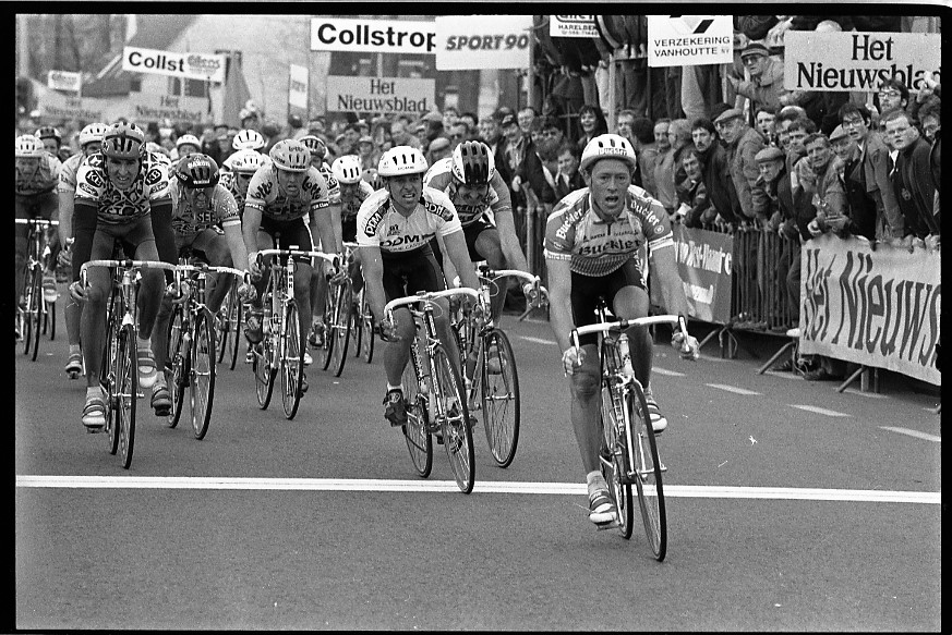 In de eindspurt staat geen maat op Vanderaerden. Hij wint voor de Duitsers Uwe Raab (PDM) en Remig Stumpf (Histor-Sigma).